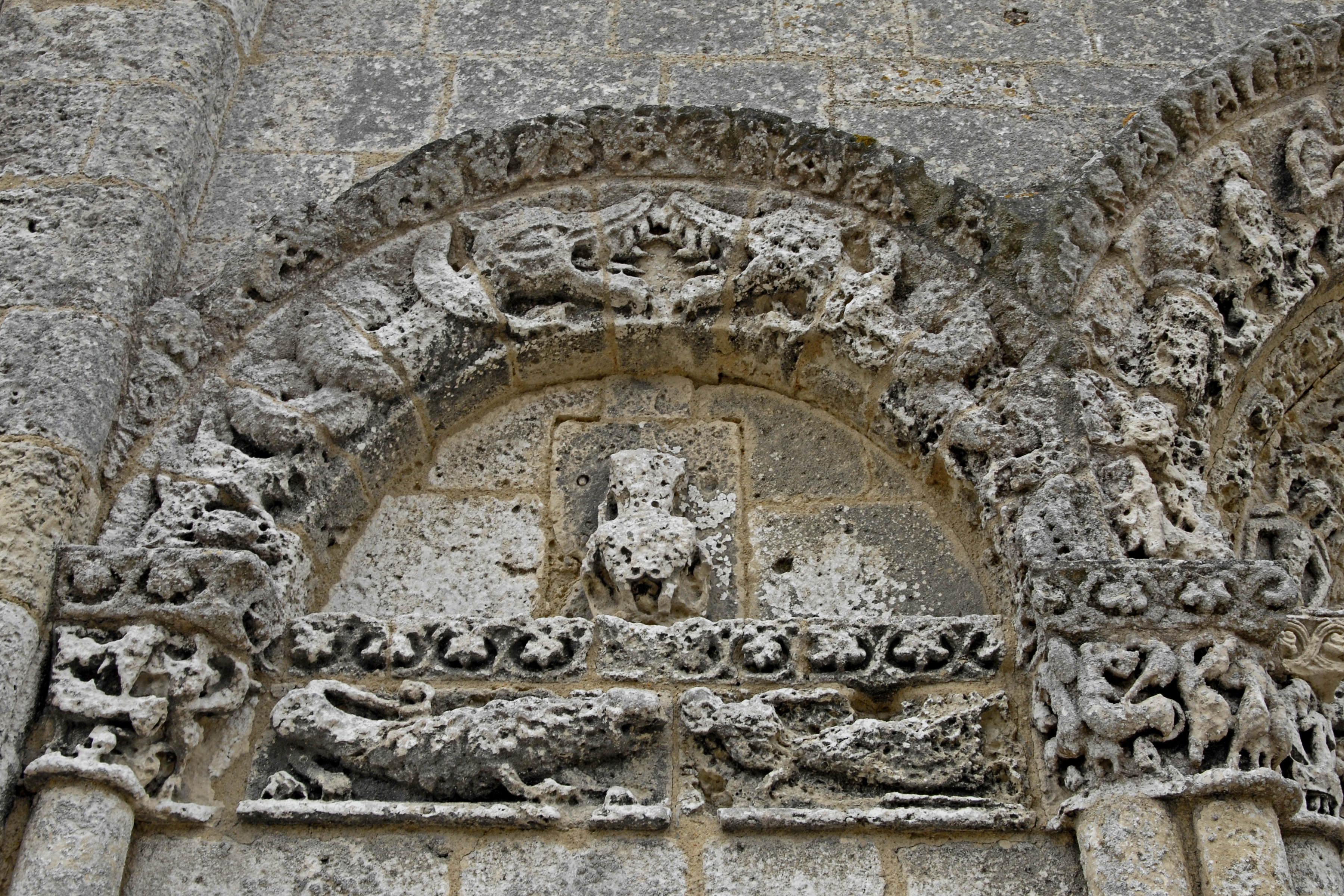 Sainte-Radegonde-Talmont-sur-Gironde, linkes Scheinportal